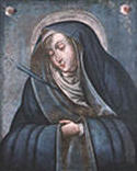 Pintura colonial, según algunos historiadores la primera hecha en Territorio chileno